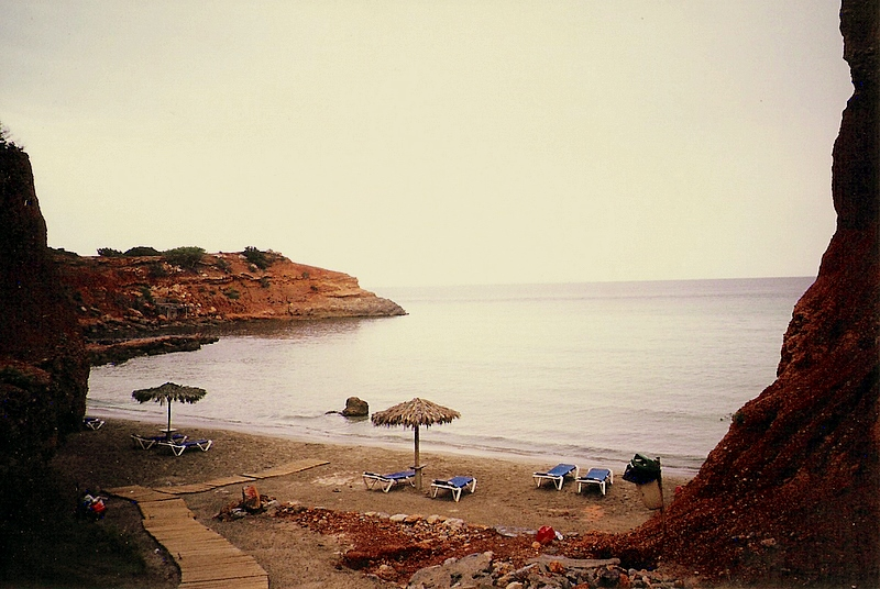 Platja de sa Caleta, a Eivissa